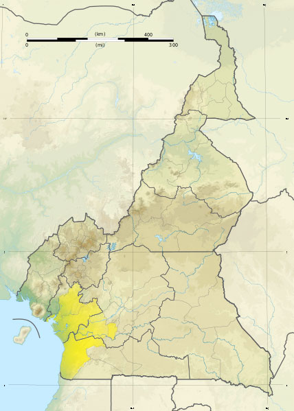 Les territoires Bassa au Cameroun